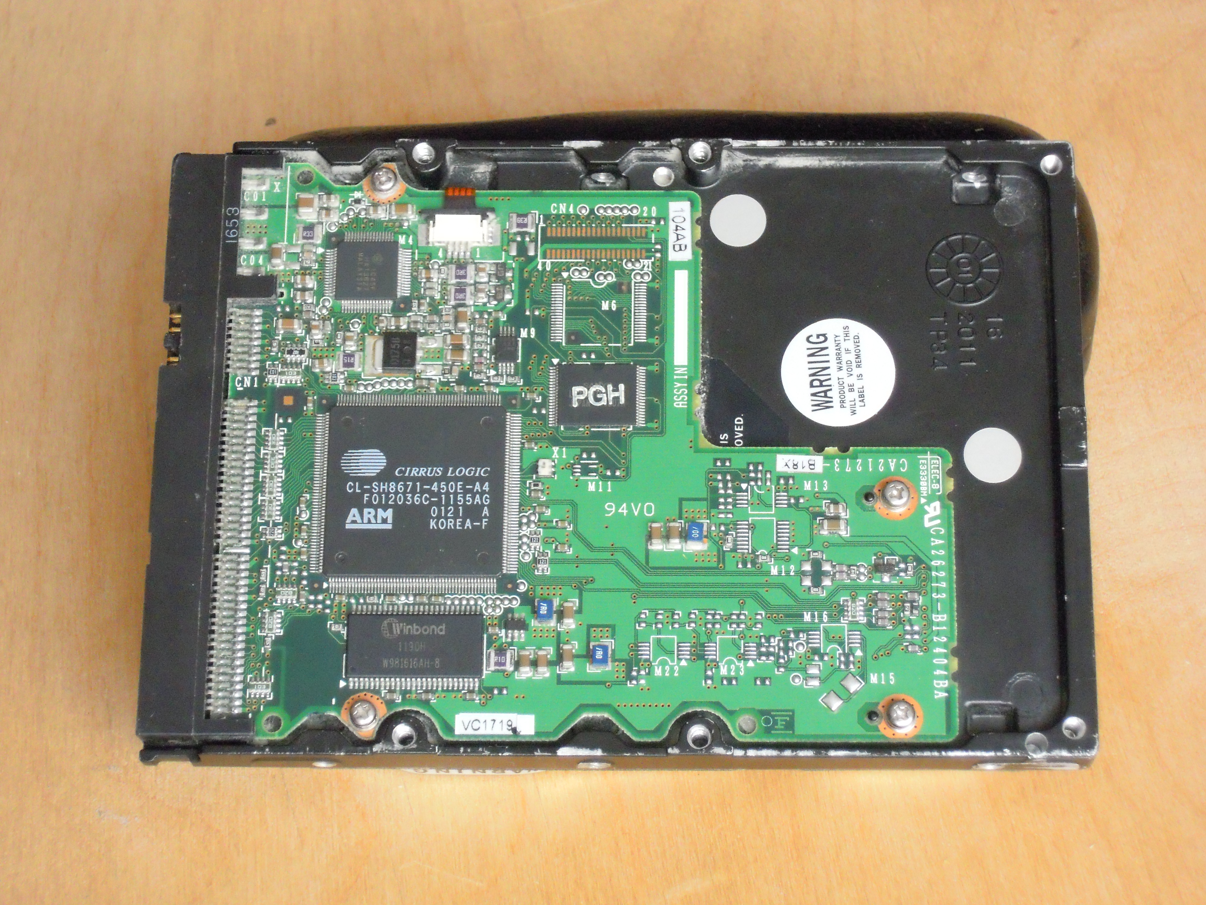 Diskaparato «Fujitsu MPG3307AH» (malsupra flanko).